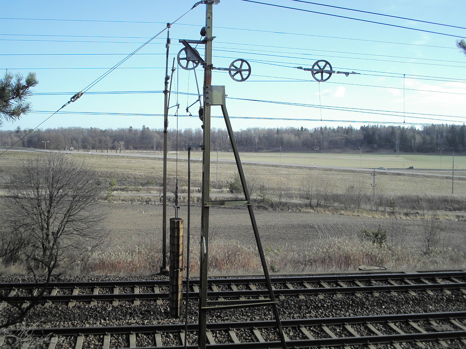 Spännanordning